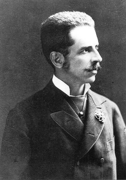 Csáky Albin (1841–1912) politikus, miniszter portréja. Koller Károly fényképfelvétele (1885 körül)